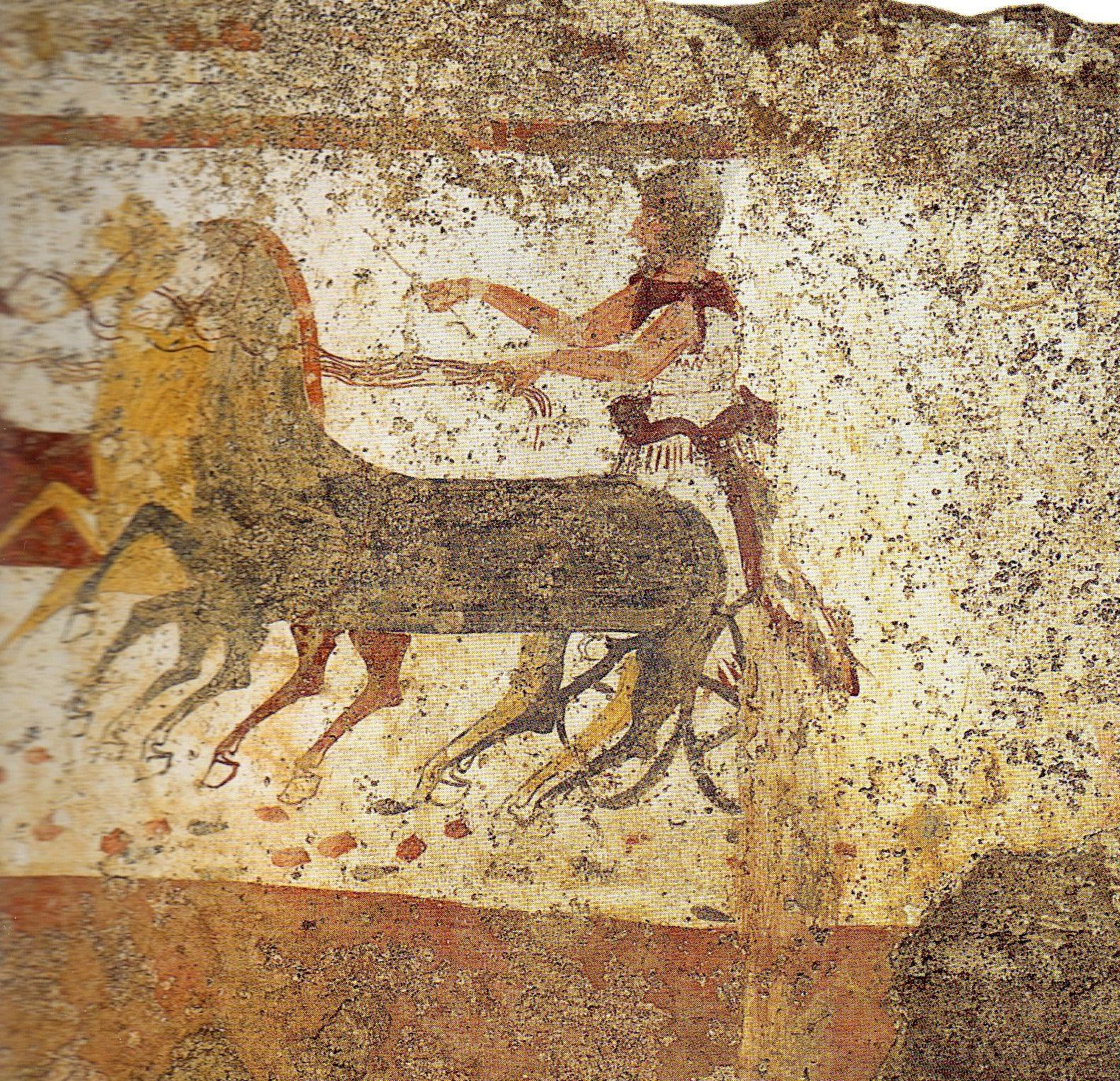 Paestum, Grab der Nereide. Detail